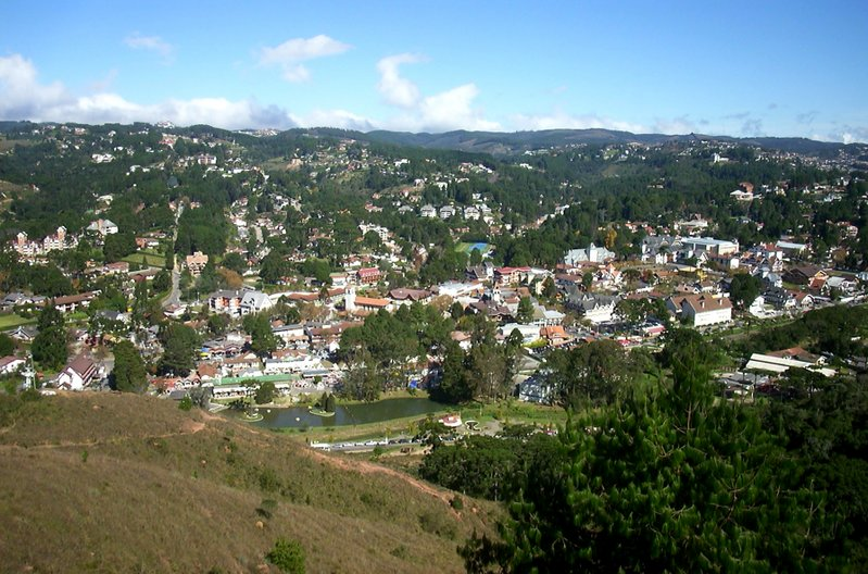 Panoramic view of the city of Campos do Jordão, São Paulo, Brazil. Taken from the Mirante do Morro do Elefante. Photo by Renato M.E. Sabbatini, May 2002. Vista panorâmica de Campos do Jordão. Tirada por Renato M.E.Sabbatini, para a Wiki, com licença GFDL.